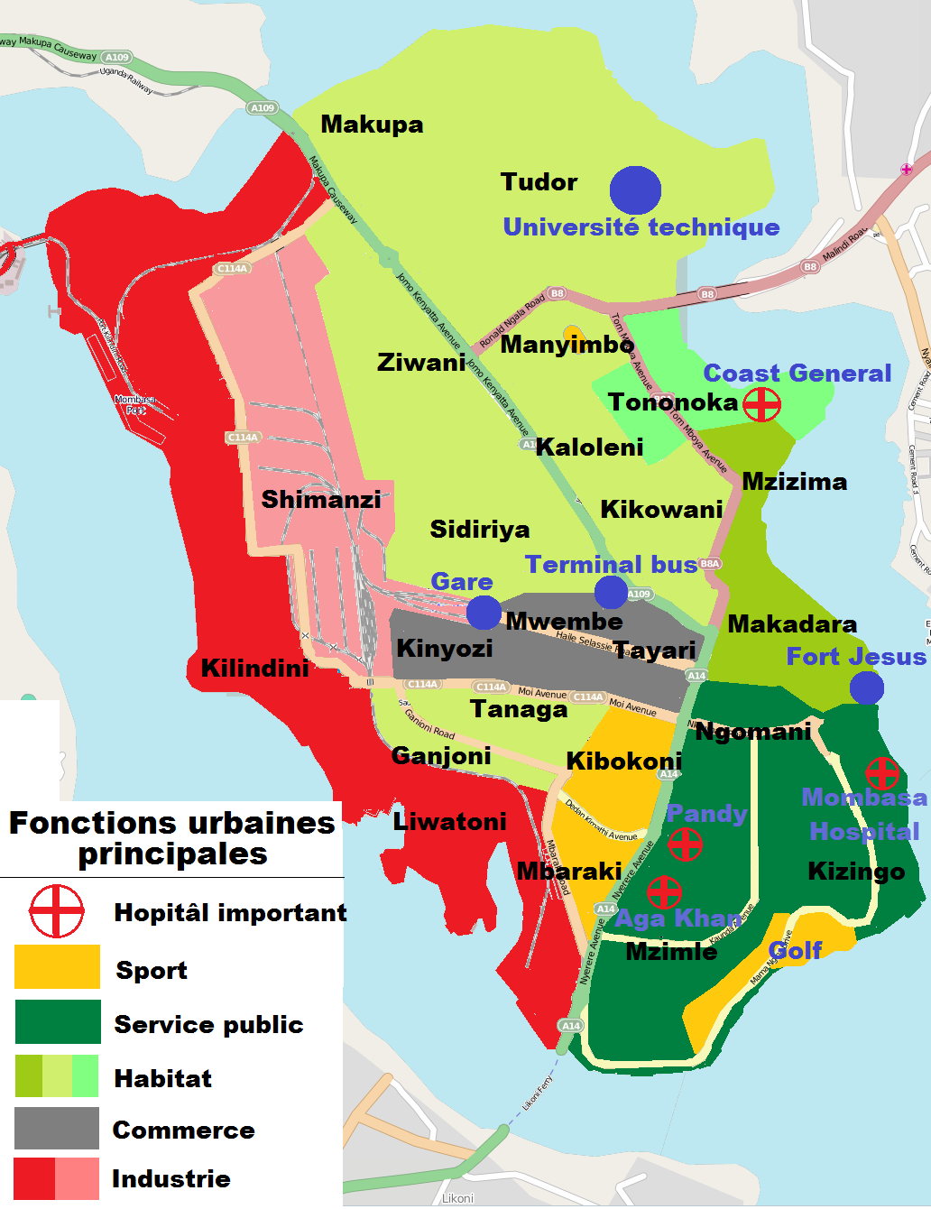 Zones de fonctions urbaines de Mvita (Mombasa)